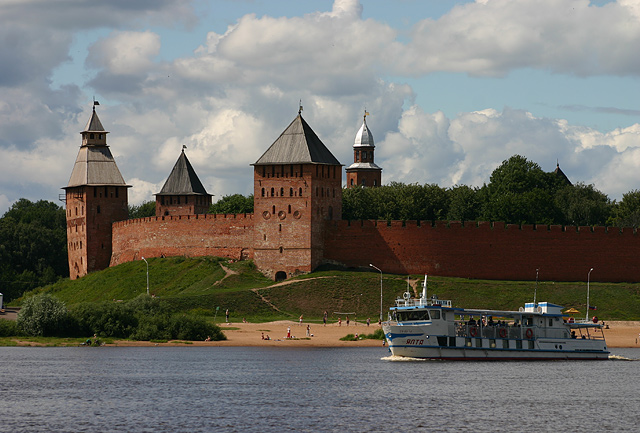 Ансамбль Новгородского Кремля (Новгородская область, Великий Новгород, Кремль)